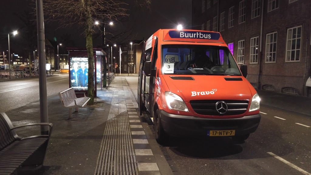 Wijkbus in Breda. Gereden met 8-persoonsbusjes.